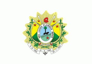 Bandeira-insígnia do governador do estado do Acre, Brasil.